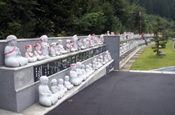 御誕生寺の地蔵